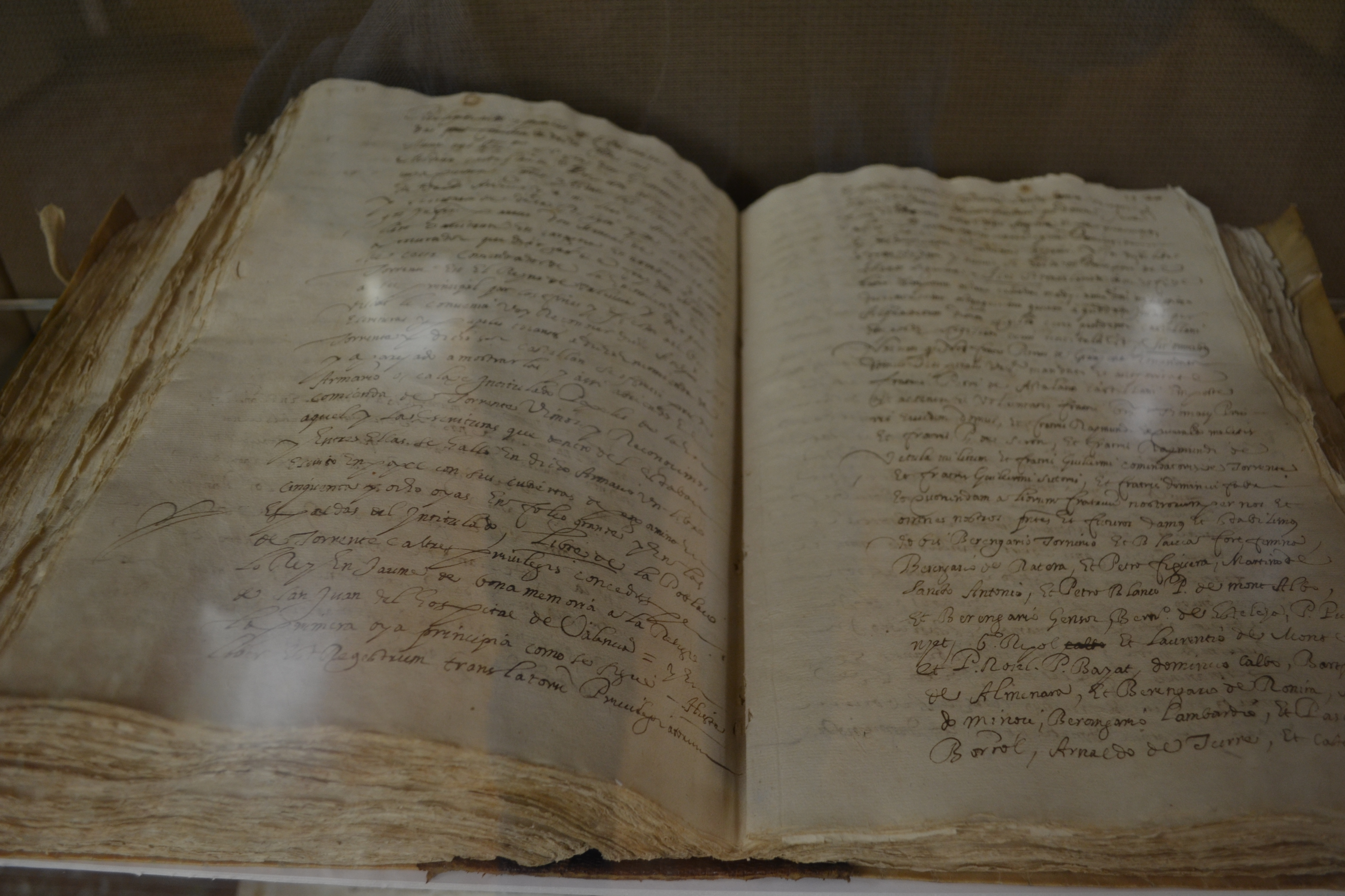 Fra Pere de Granyana, Comanador de les cases de València de l'Orde de l'Hospital, atorga carta pobla a les alqueries de Torrent i Picanya, per a 50 pobladors i a fur de València (18 de novembre de 1248). ARV: Manaments i empars, 1639, llibre 5, mà 51, fol. 18 (còpia de 26 d'octubre de 1639). Arxiu del Regne de València.